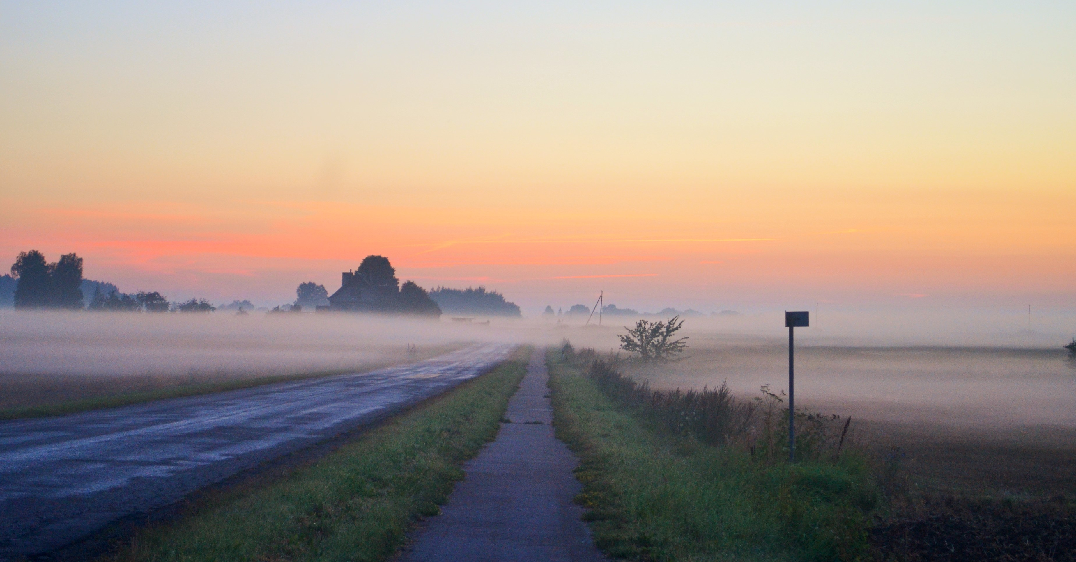 Tubių kaimas per miglas, Kėdainių raj.